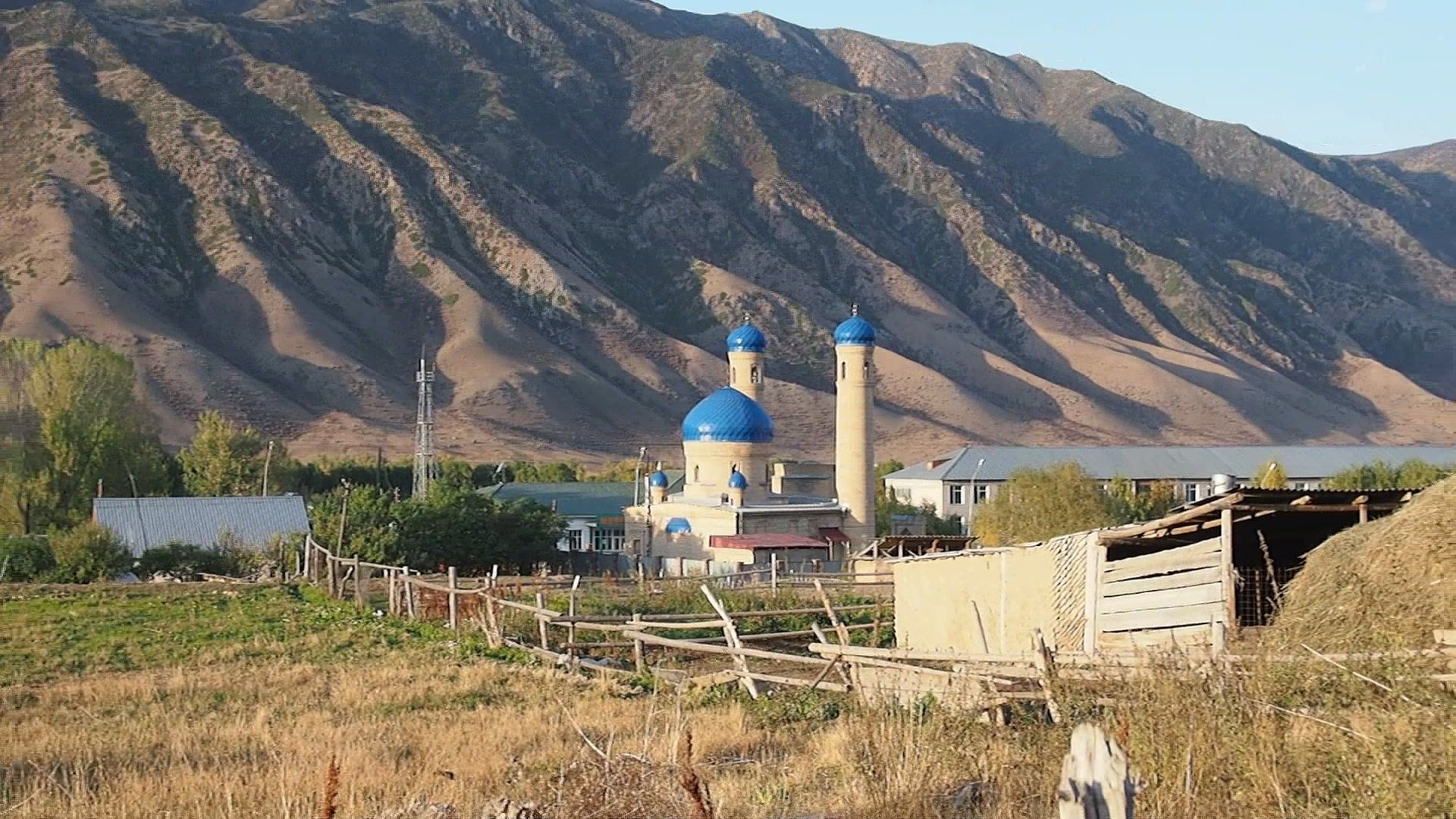 Das Dorf Saty in der Region Almaty, Kasachstan